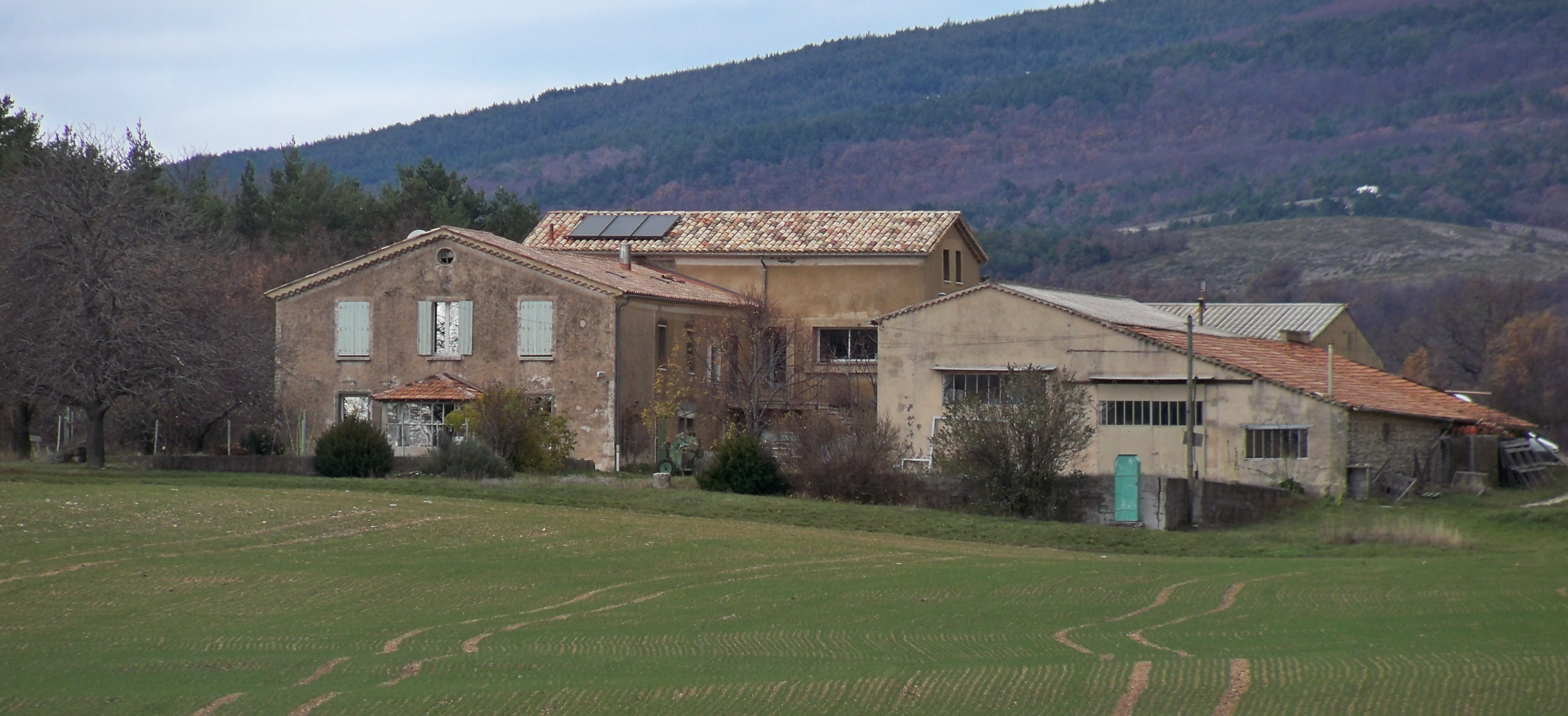 Maison à Terre à Revest du Bion (04)